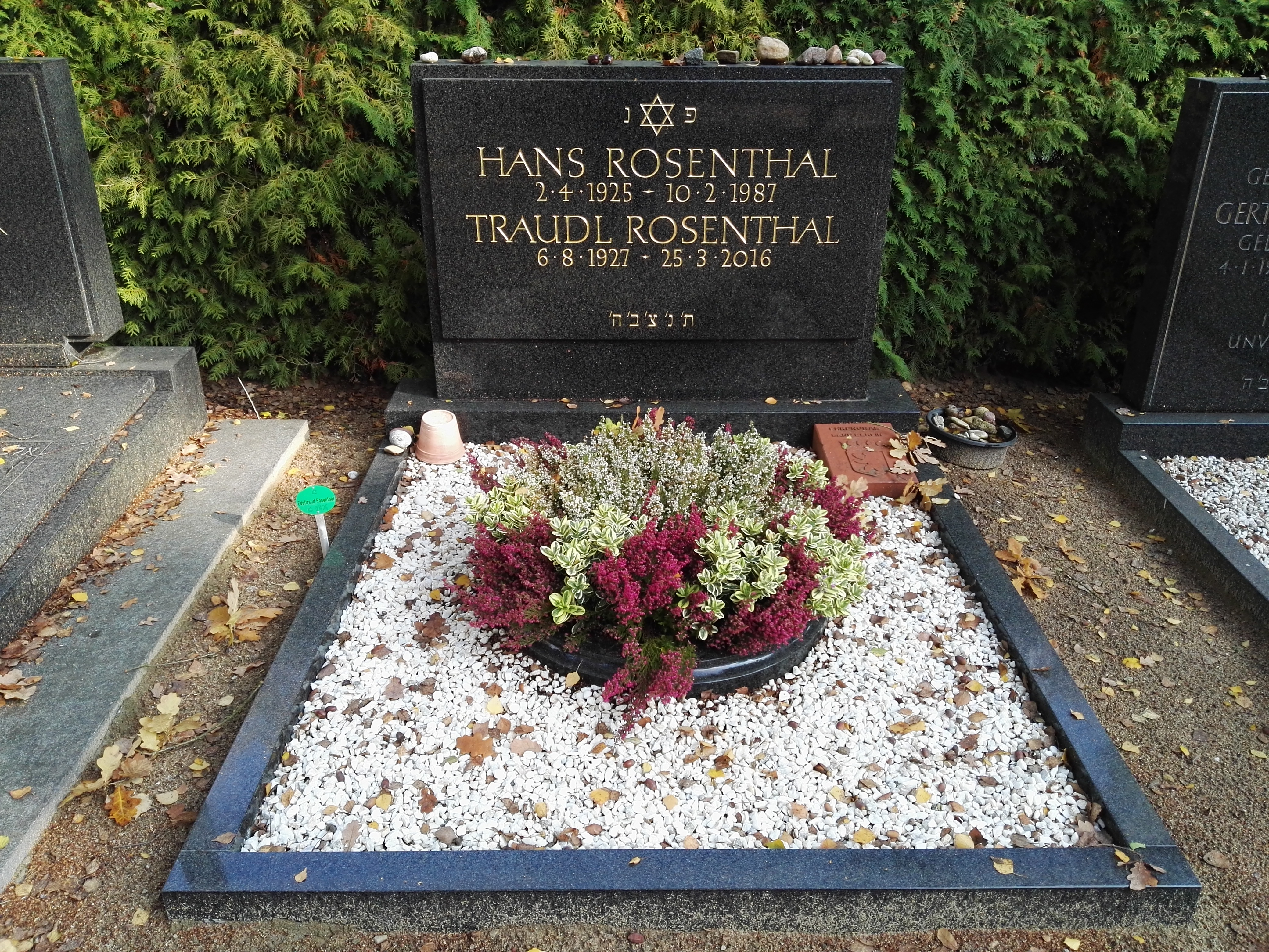 Grab von Hans Rosenthal auf dem Jüdischer Friedhof Heerstraße. Ehrengrab